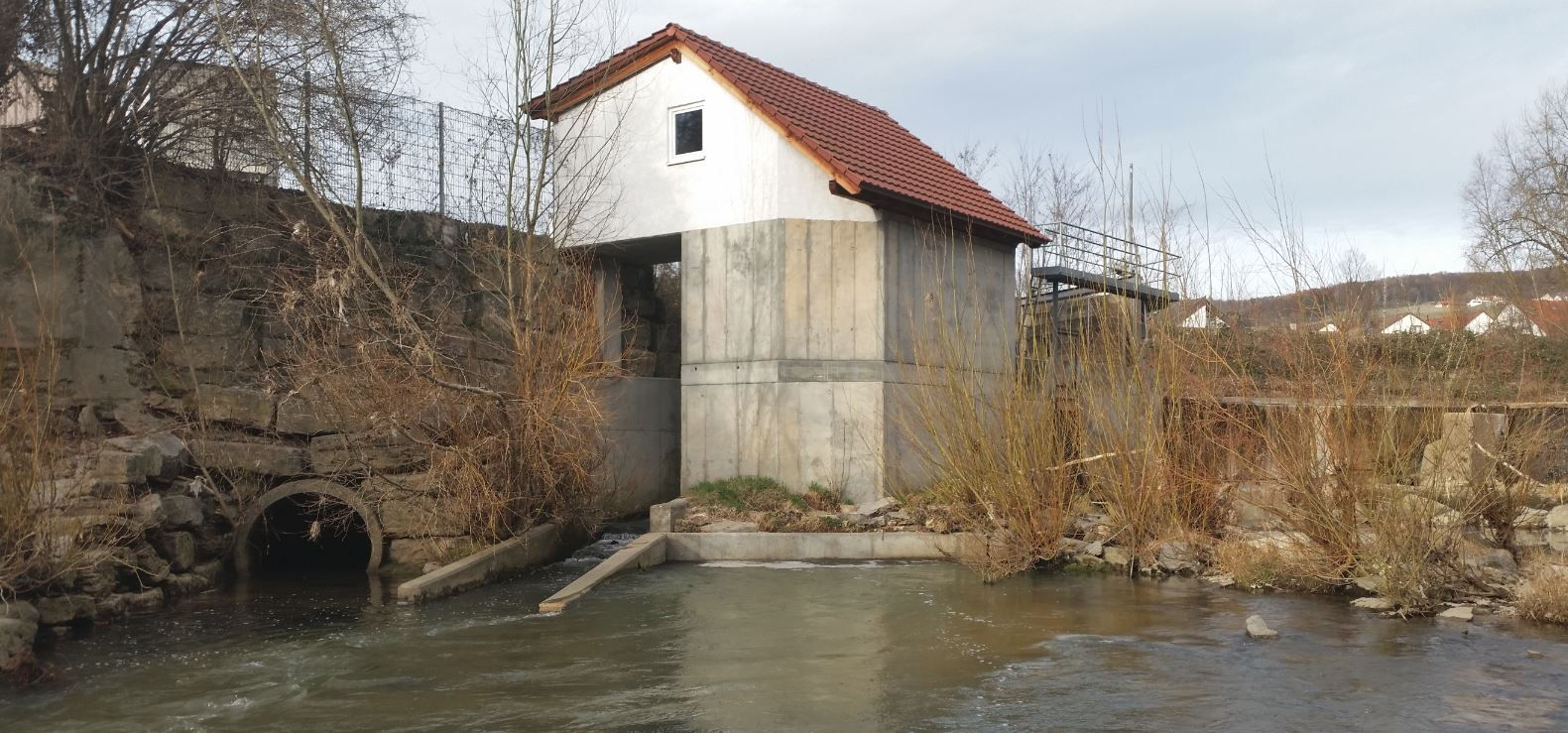 Wasserkraftanlage Remshalden-Grunbach, am 3. März 2019